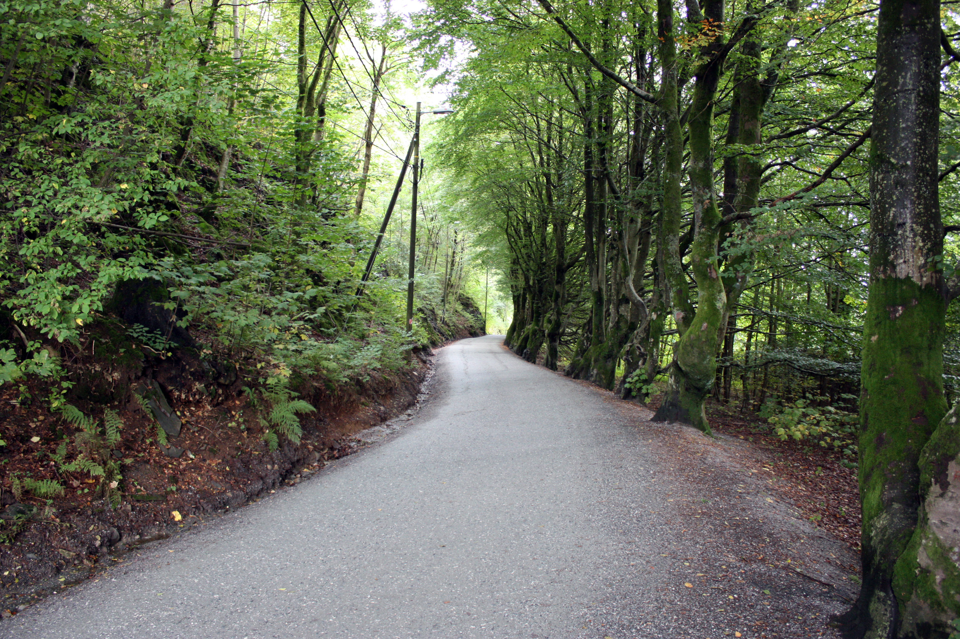 Troldhaugvegen, Fana, Bergen.